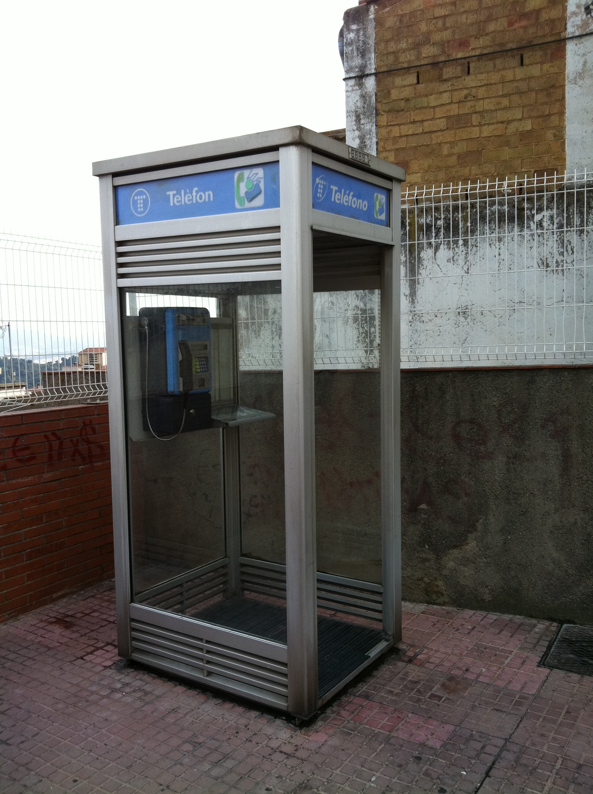 El Papiol Cabina telefònica a el Papiol